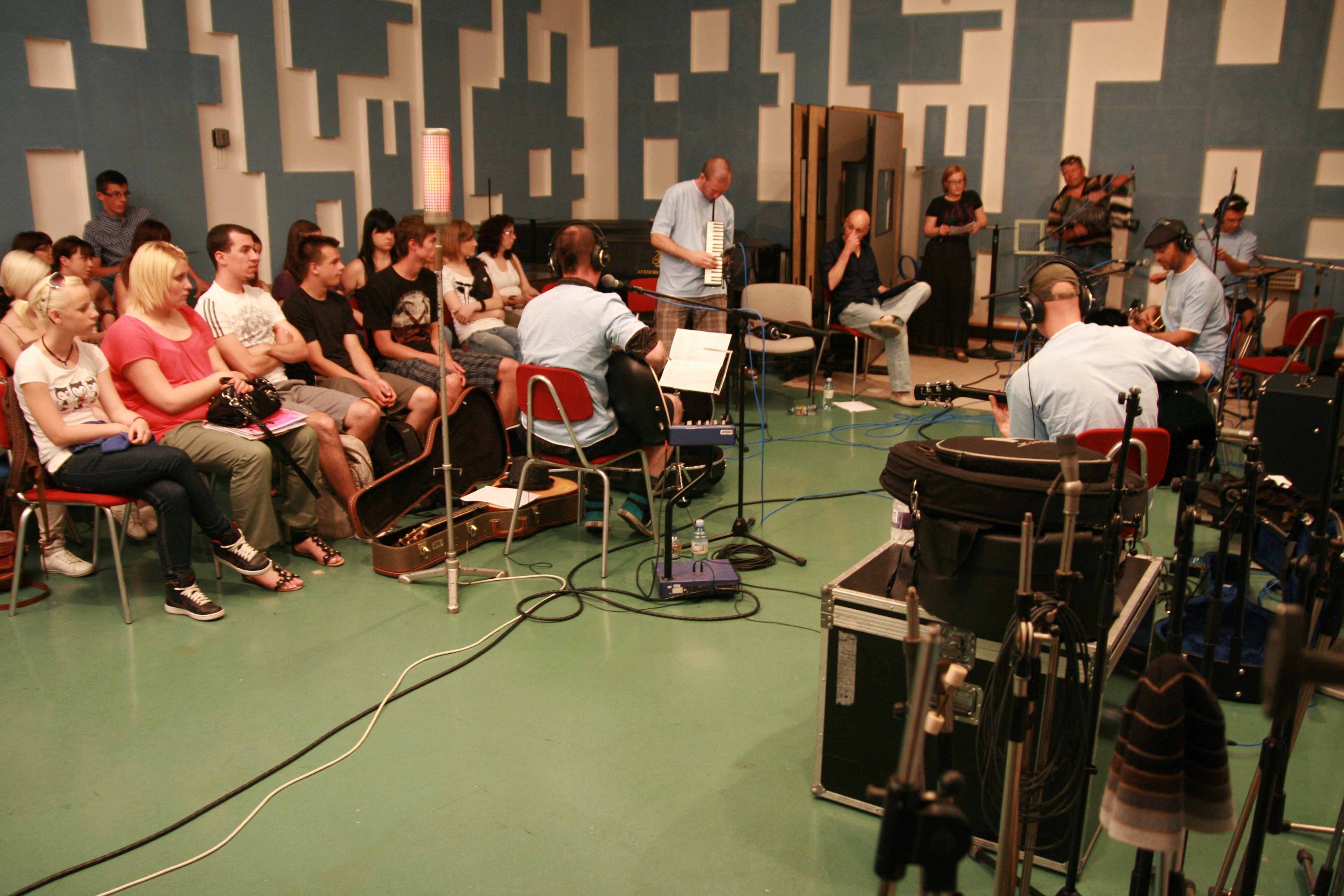 Studio Hendrix